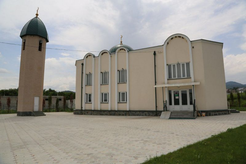 Центральяная мечеть в Белой Речке